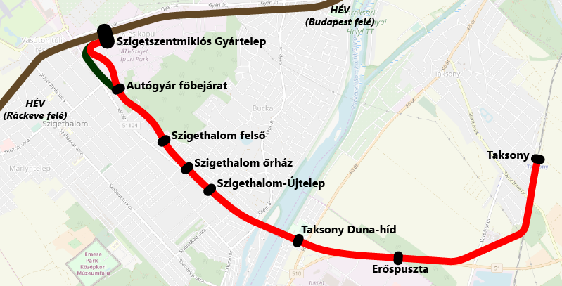 Az egykori Szigethalom–Taksony HÉV-vonal nyomvonala. This map may be incomplete, and may contain errors. Don't rely solely on it for navigation.